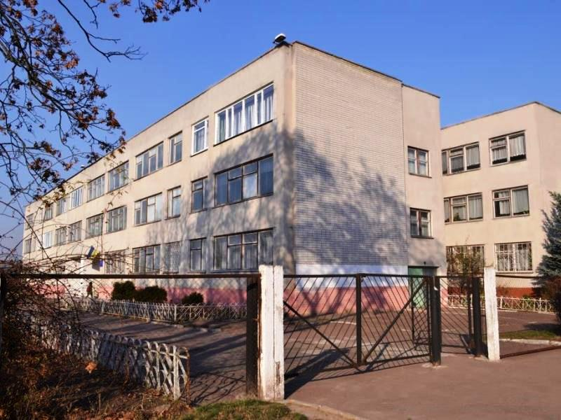 Зображення ліцею